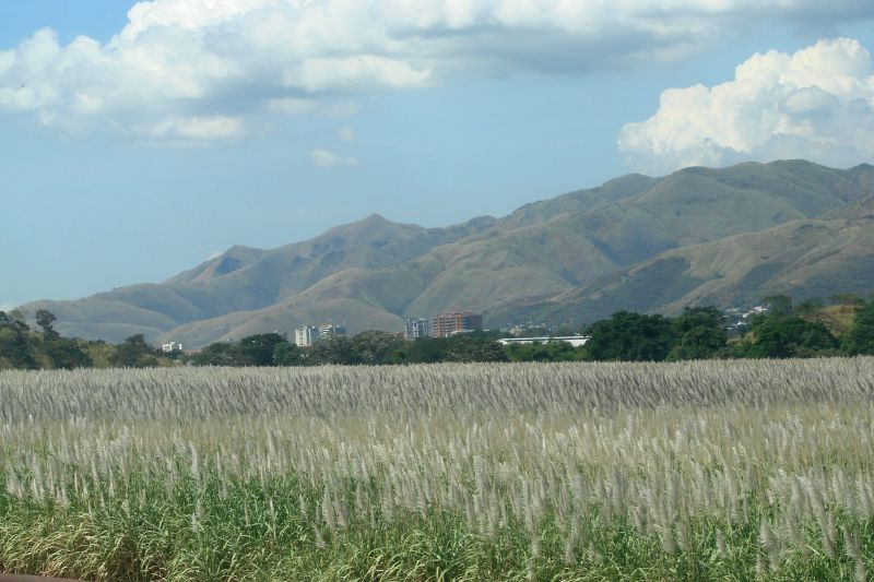 Flor de Caña